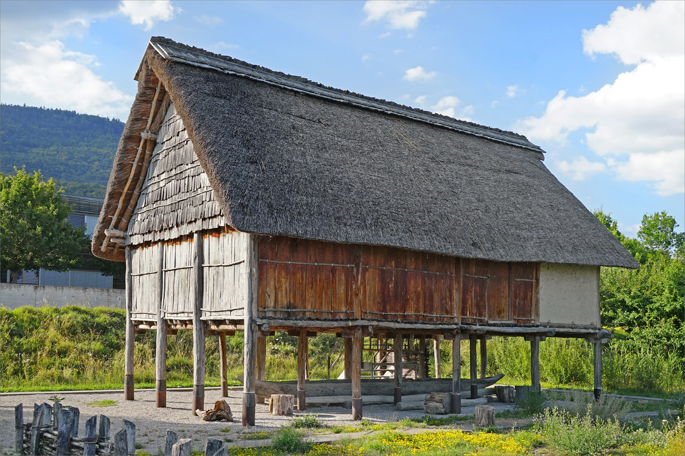 Reconstitution d'une maison d'il y a 3000 ans dans le parc du Laténium Cette maison de la fin de l'âge du bronze montre une technique de construction à plancher surélevé qui permettait de faire face aux inondations, phénomène fréquent autour des lacs du pays de Neuchâtel avant la correction des eaux du Jura entre 1869 et 1891. Ce type de maison est courant dans les cités lacustres. Le Laténium est un parc et un musée d'archéologie régionale, ouvert en 2001 sur les bords du lac de Neuchâtel en Suisse. Son nom évoque le site archéologique de La Tène, (situé à quelques centaines de mètres) qui est une référence pour la civilisation celtique ayant habité l’Europe entière, de l’Irlande à la Turquie, de 450 à 50 av. J.-C. Site officiel du Laténium, parc et musée d'archéologie de Neuchâtel latenium.ch/